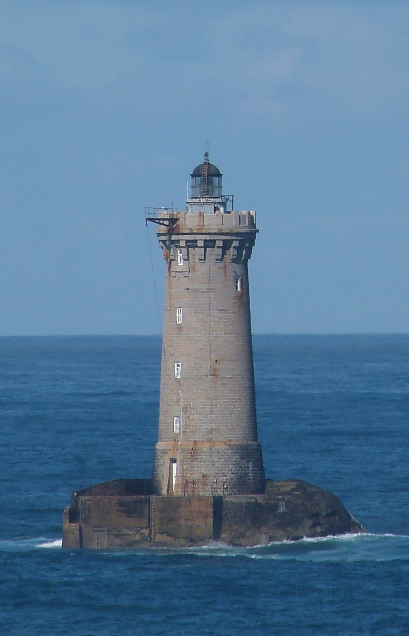 Phare du Chenal du Four